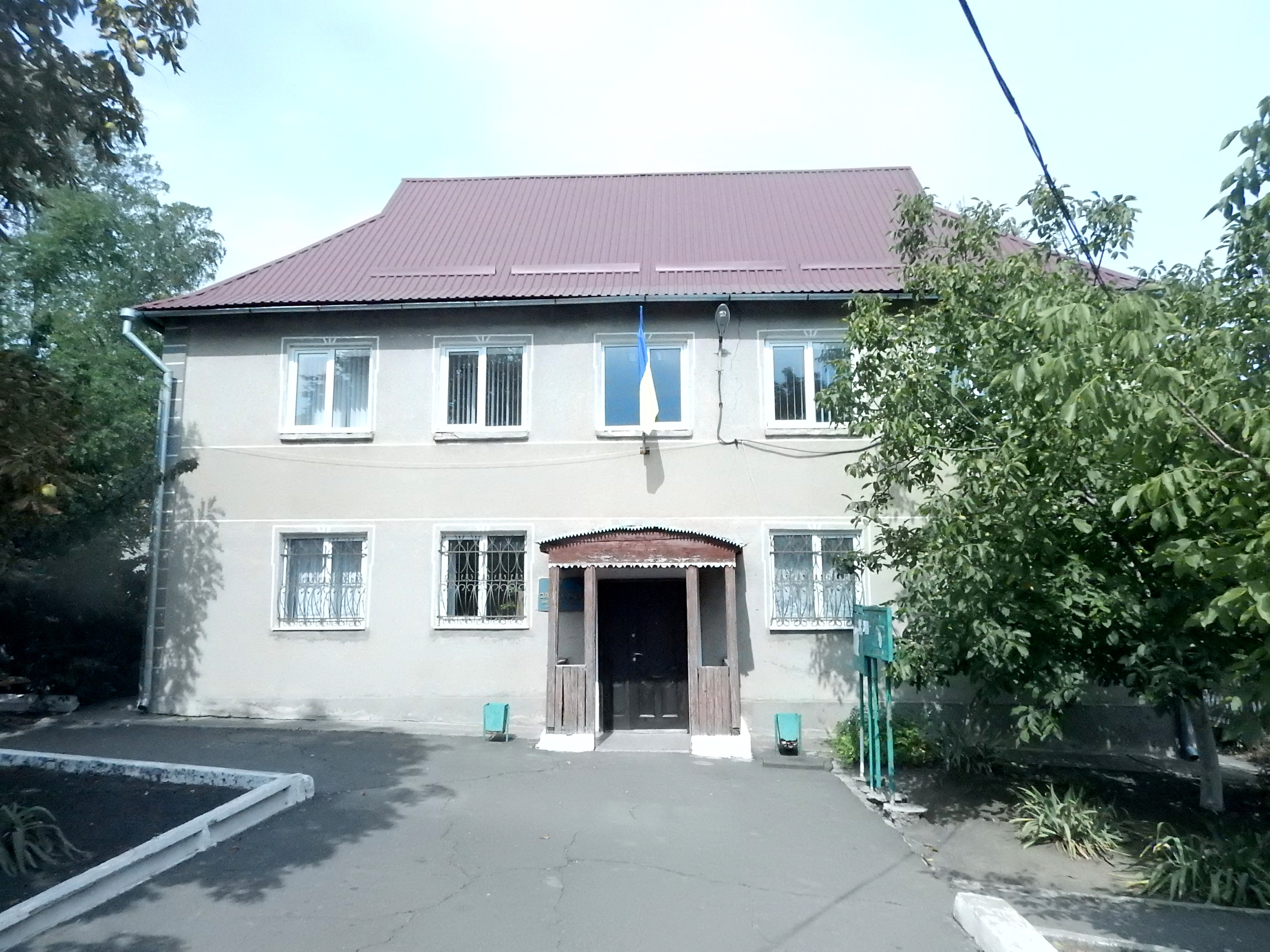 Вікіекспедиція Північ Одещини